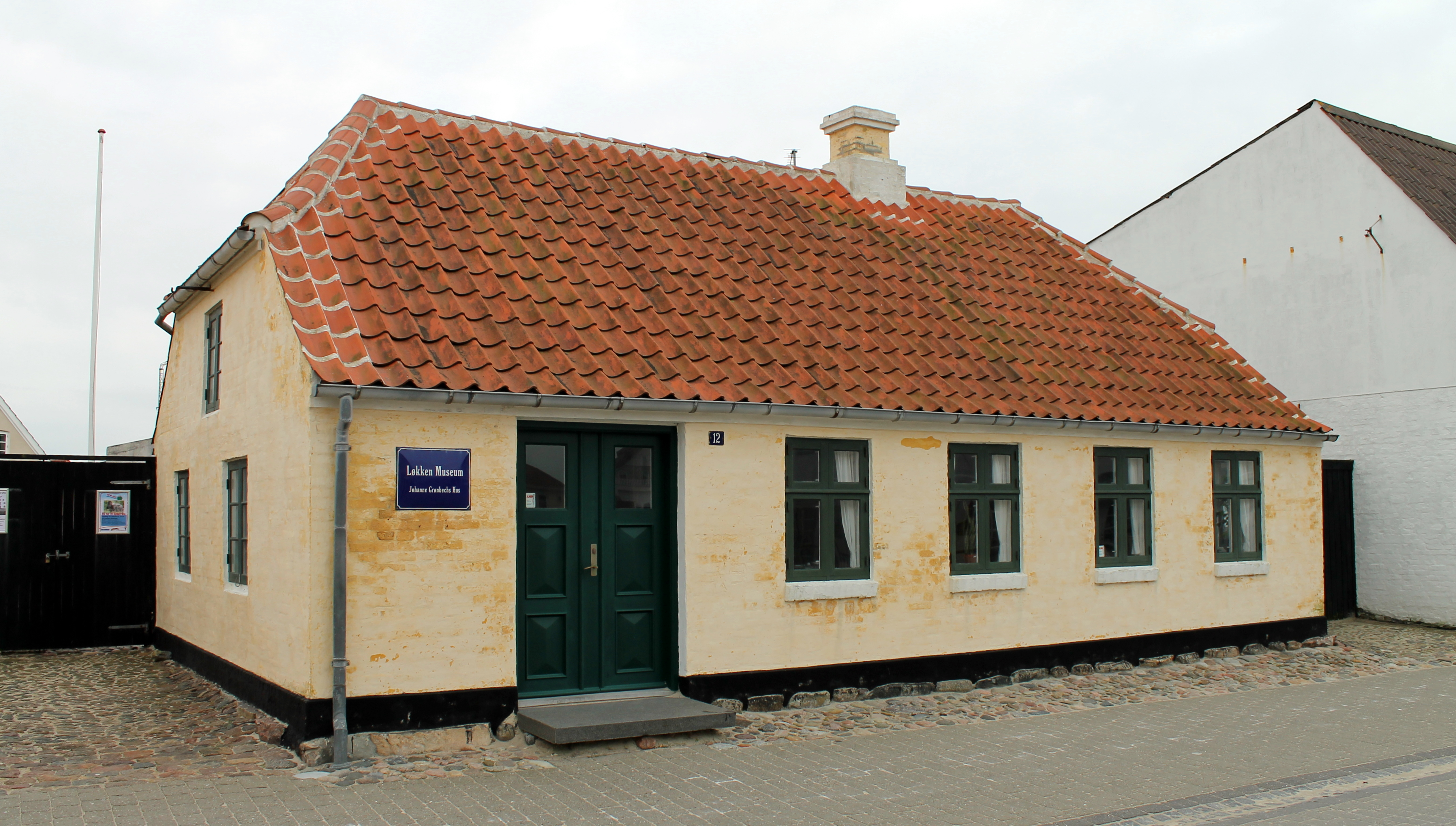 Løkkens Museum